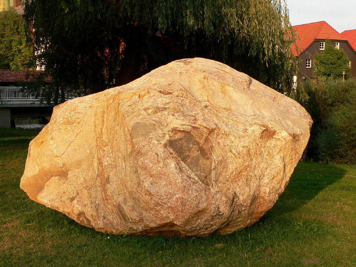 Direktdraufsicht auf den Findling (Gifhorn), i Zentrum deutlich erkennbar bräunliches Fremdgestein im hellrosa erscheinenden Granit.